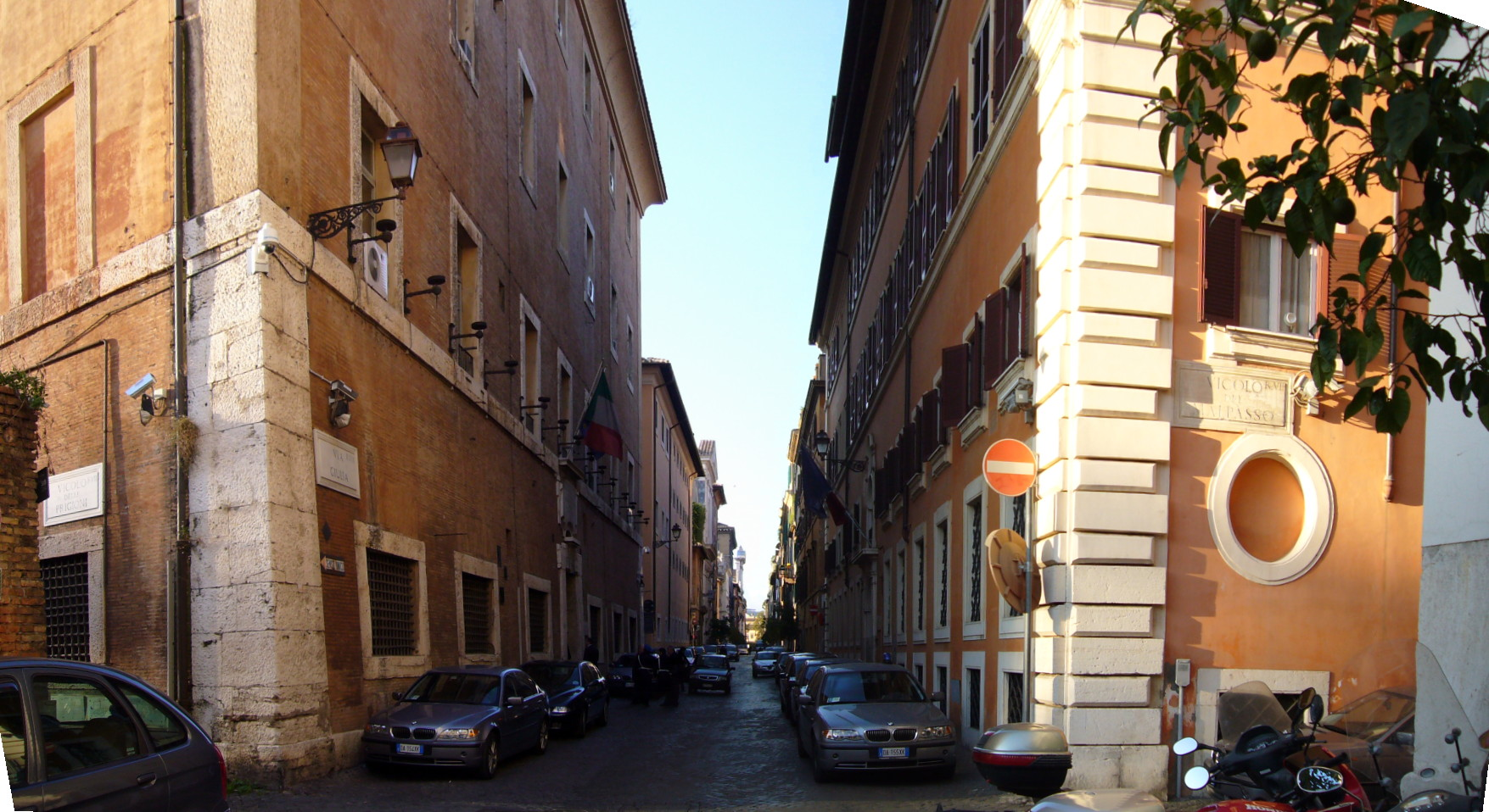 Roma, via Giulia: le Carceri Nuove tra vicolo delle Prigioni e vicolo del Malpasso